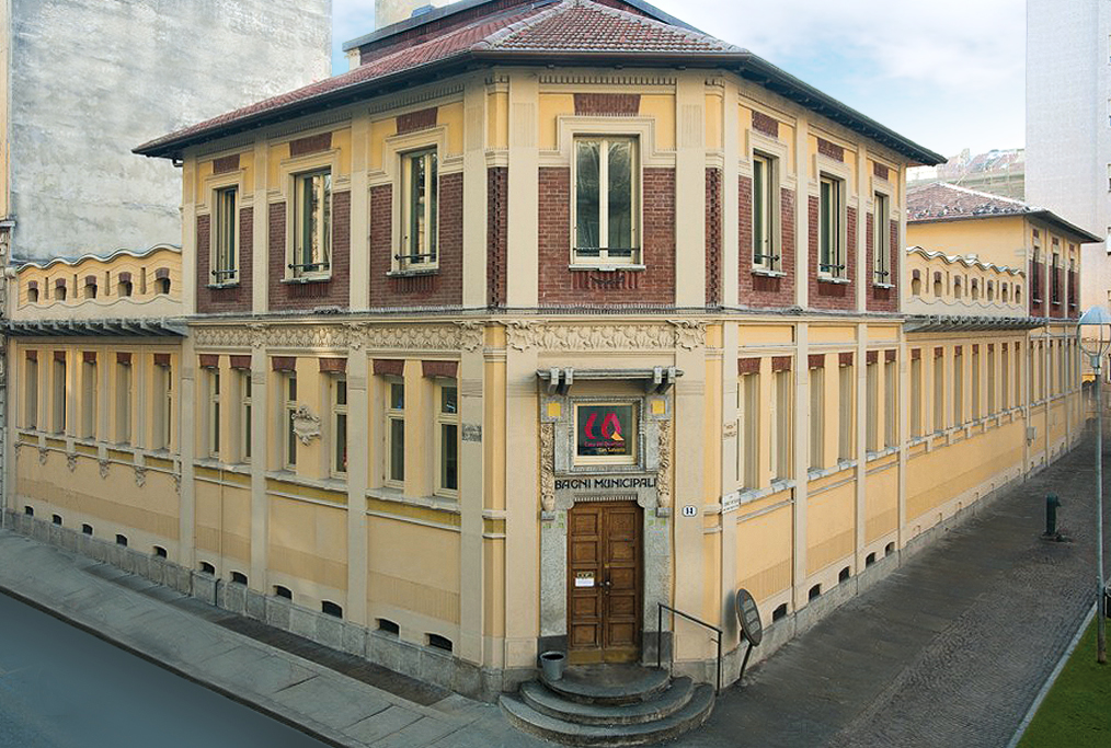 Immagine dei Bagni Municipali di via O. Morgari